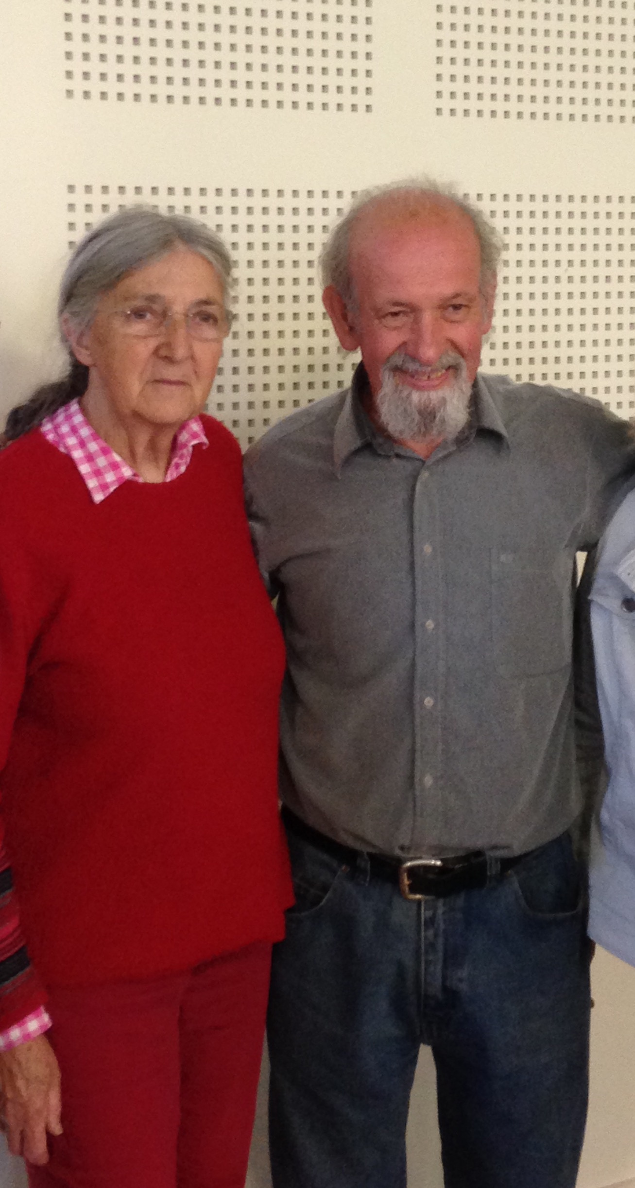 André et Cécile Minguy pendant un conférence à la roche sur yon.